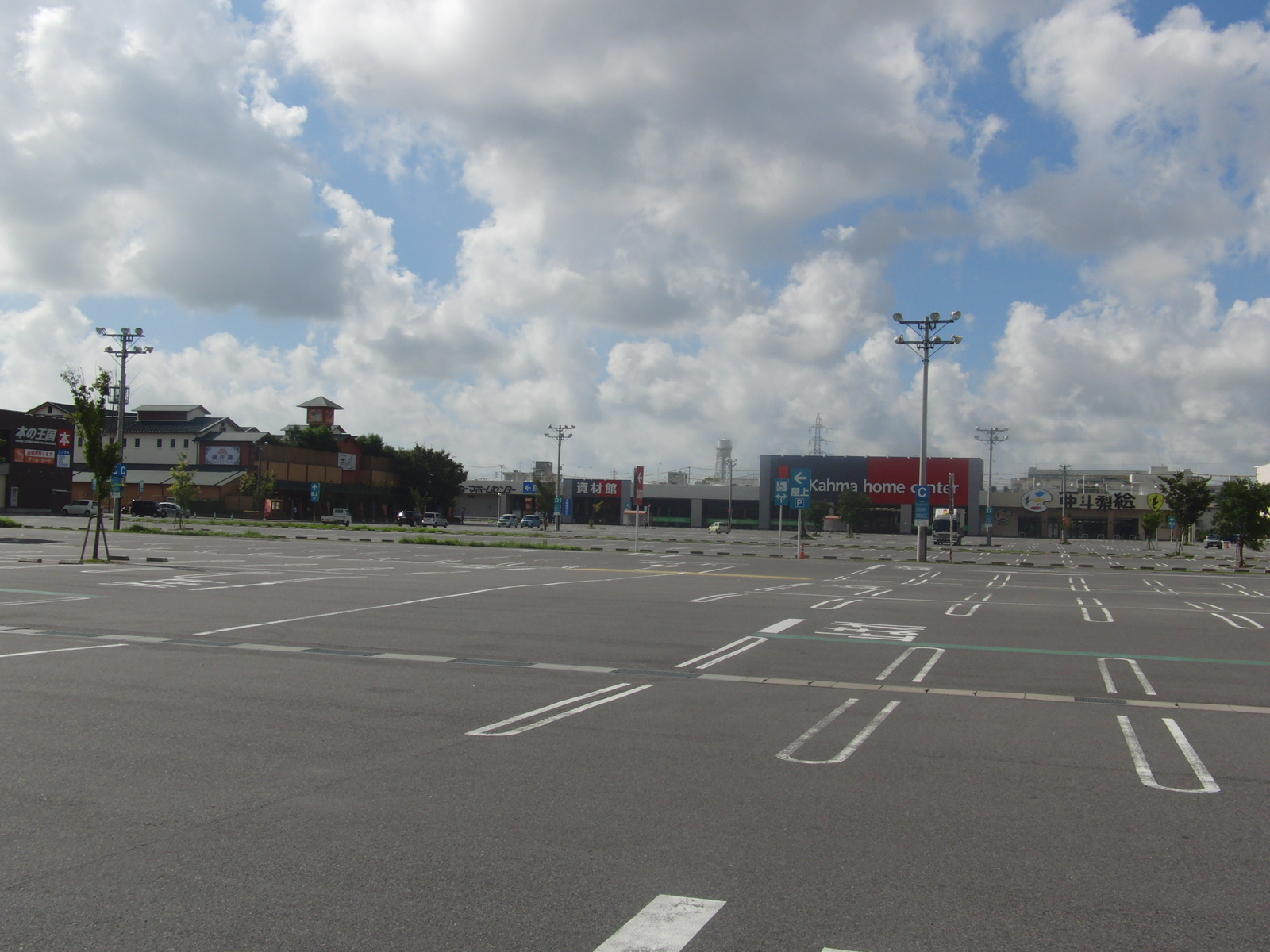 カーマホームセンター鈴鹿中央店を撮影